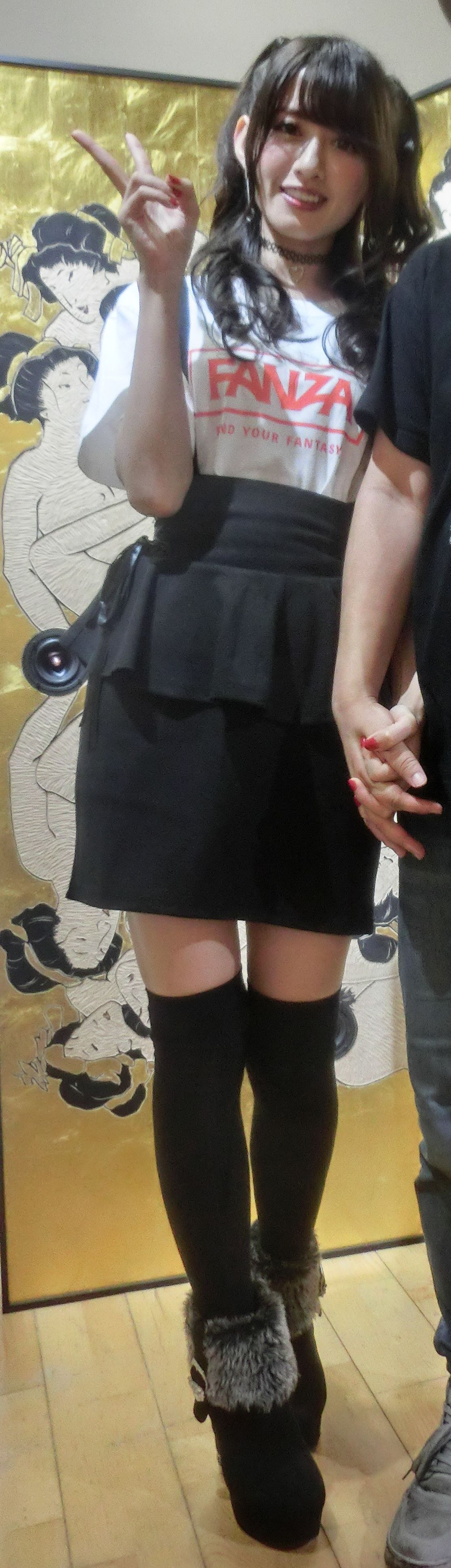 KIJIMA AIRI （2018年10月6日、FANZA×#FR2）